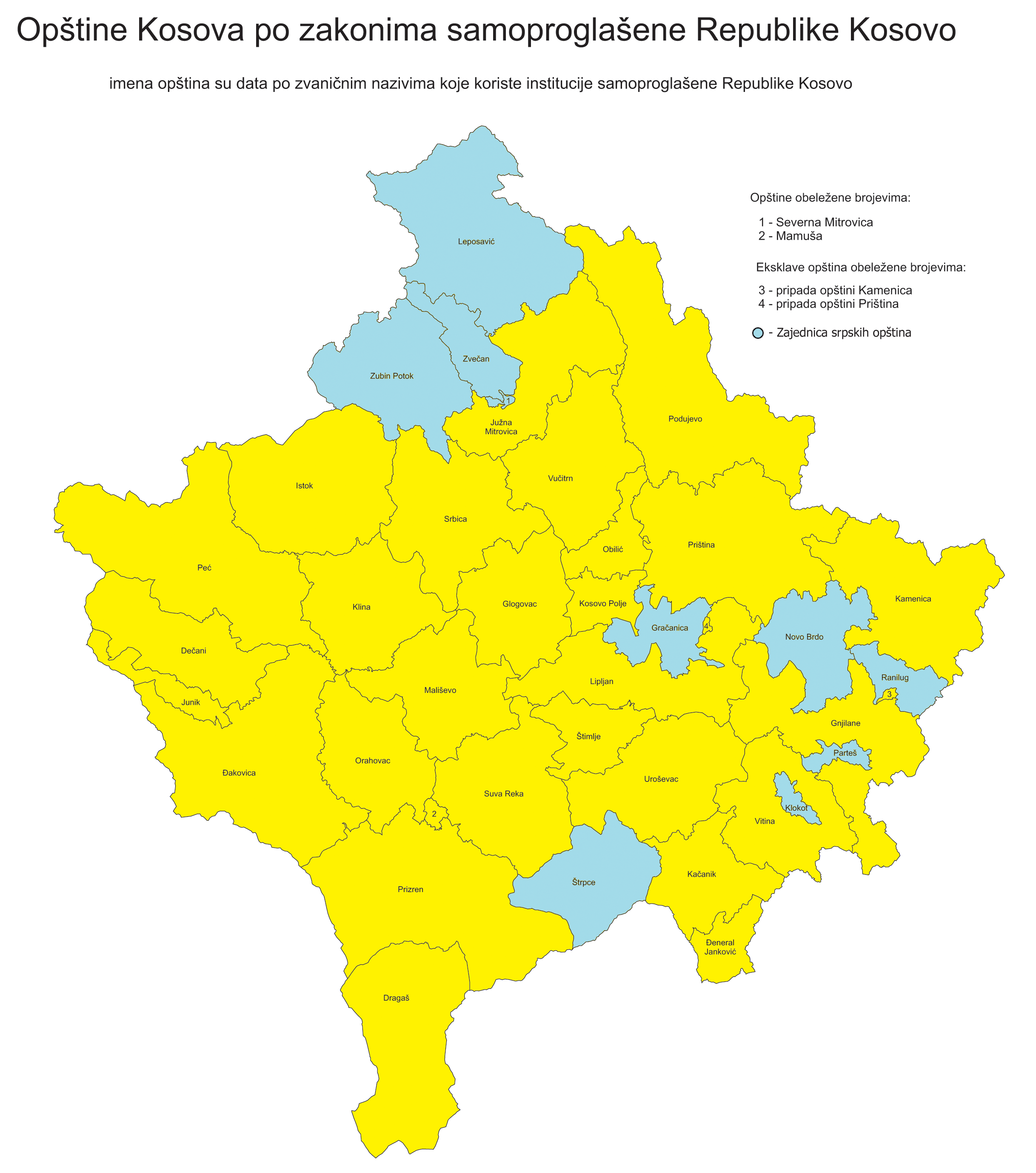 Association of Serb municipalities in Kosovo (blue). Zajednica srpskih opština na Kosovu i Metohiji (plavo).